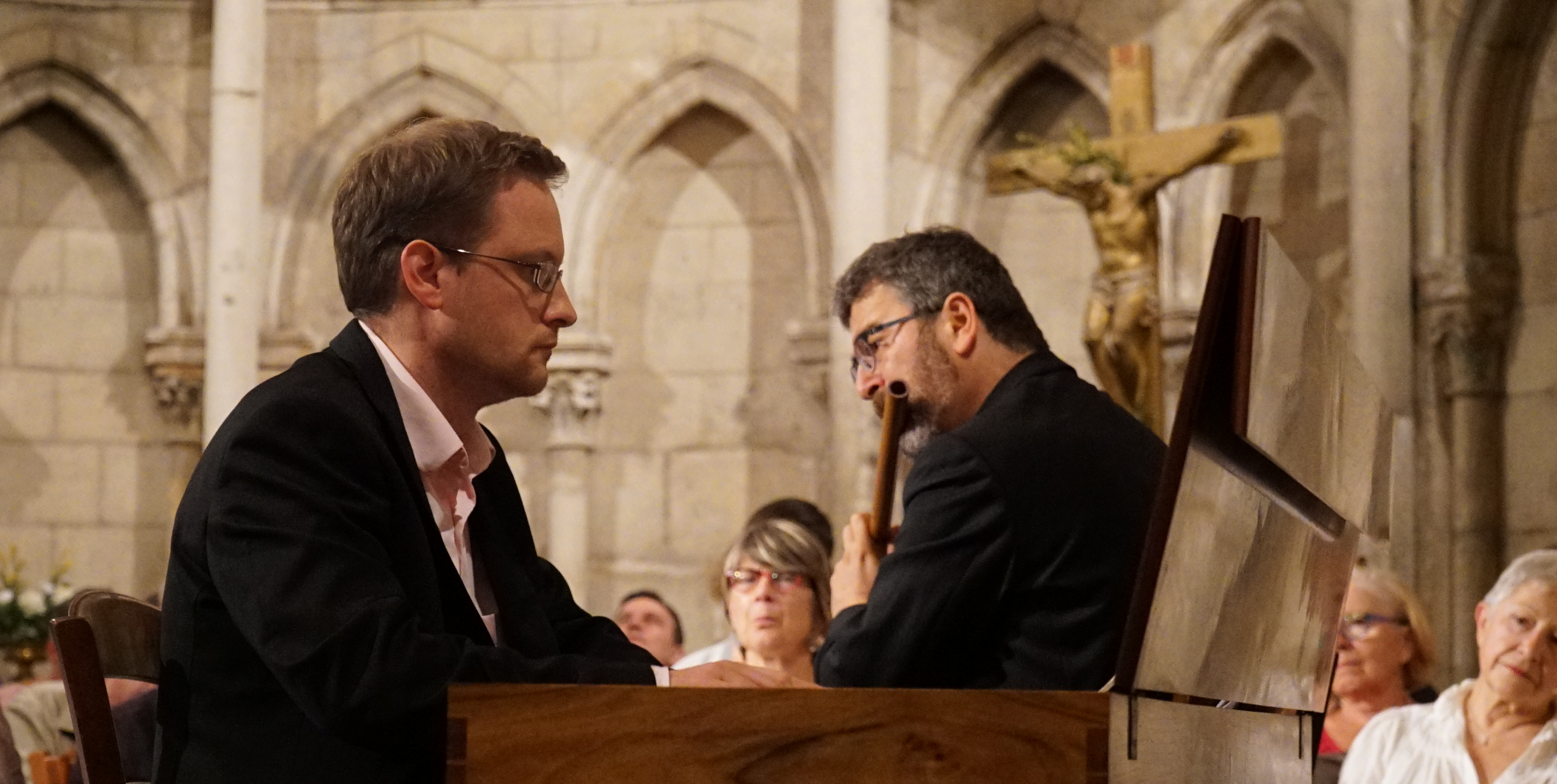 lors des "rencontres baroques rémoise" de 2015, concert Douce et extravagante virtuosité au XVIe siècle.